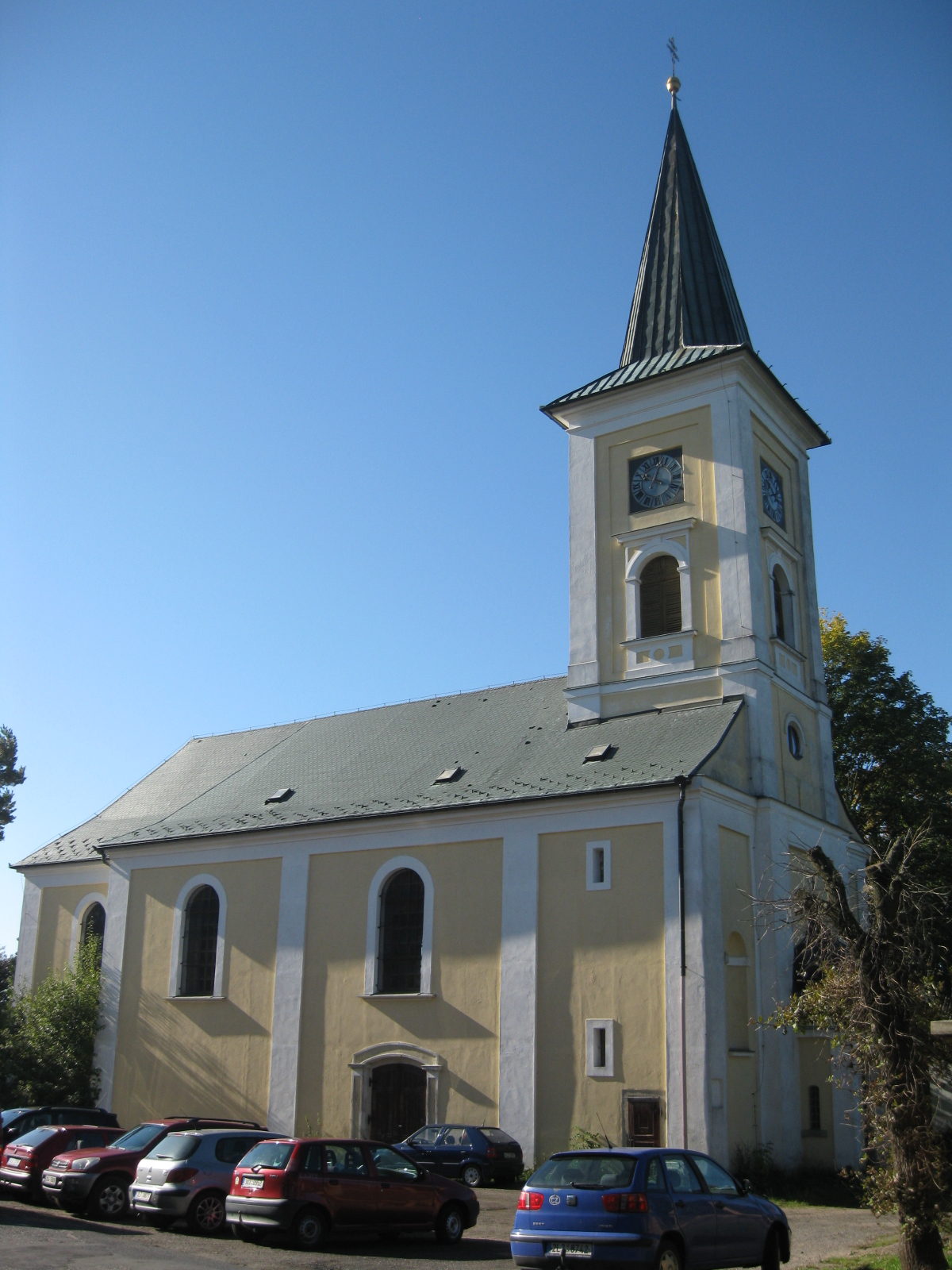 Jablonec nad Nisou-Rýnovice, kostel svatého Ducha.